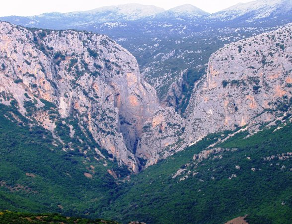 La forra di Gorroppu, vicino Dorgali (NU), Italia, ripresa dalla SS 125 Orientale Sarda. Autore Francesco Mulas, luglio 2004. Licenza GFDL.